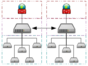 Figure présentant deux unités d'un cloud computing sur le même site géographique.